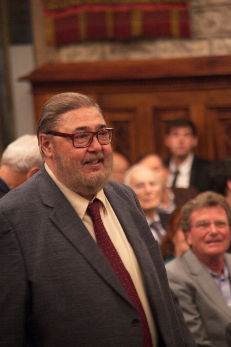 Acte de lliurament de la Medalla d'Or al Mèrit Esportiu de l'Ajuntament de Barcelona a Enric Truñó i Lagares. 6 d'octubre de 2015